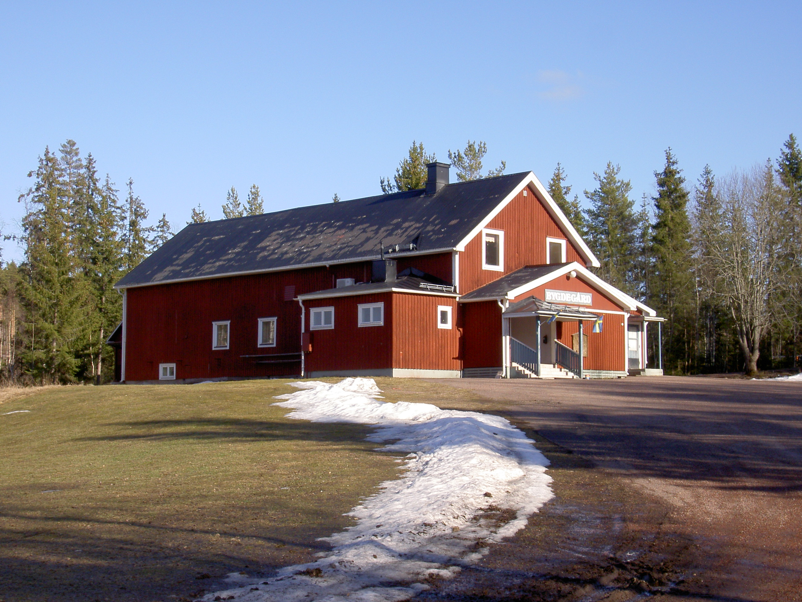 Bäsna bygdegård, Bäsna, Sverige/Sweden